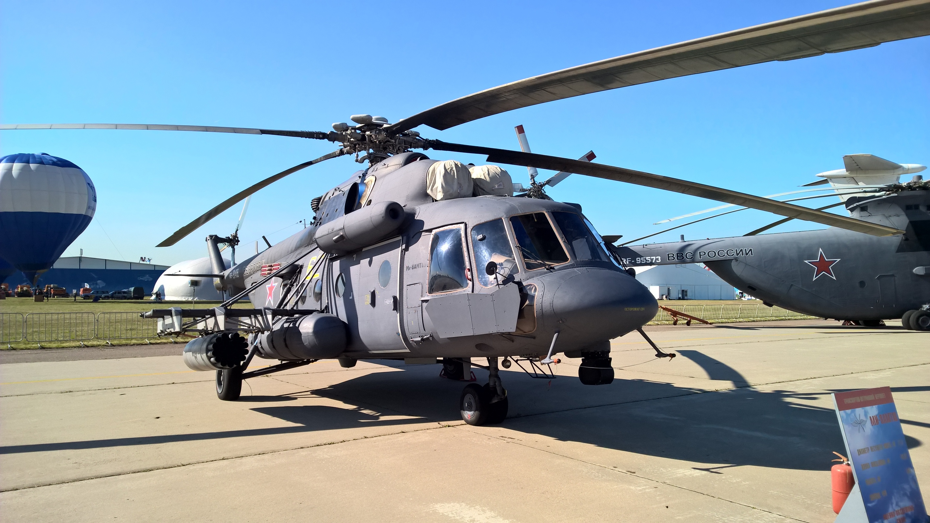 Вертолёт Ми-8АМТШ, авиасалон MAKS-2015